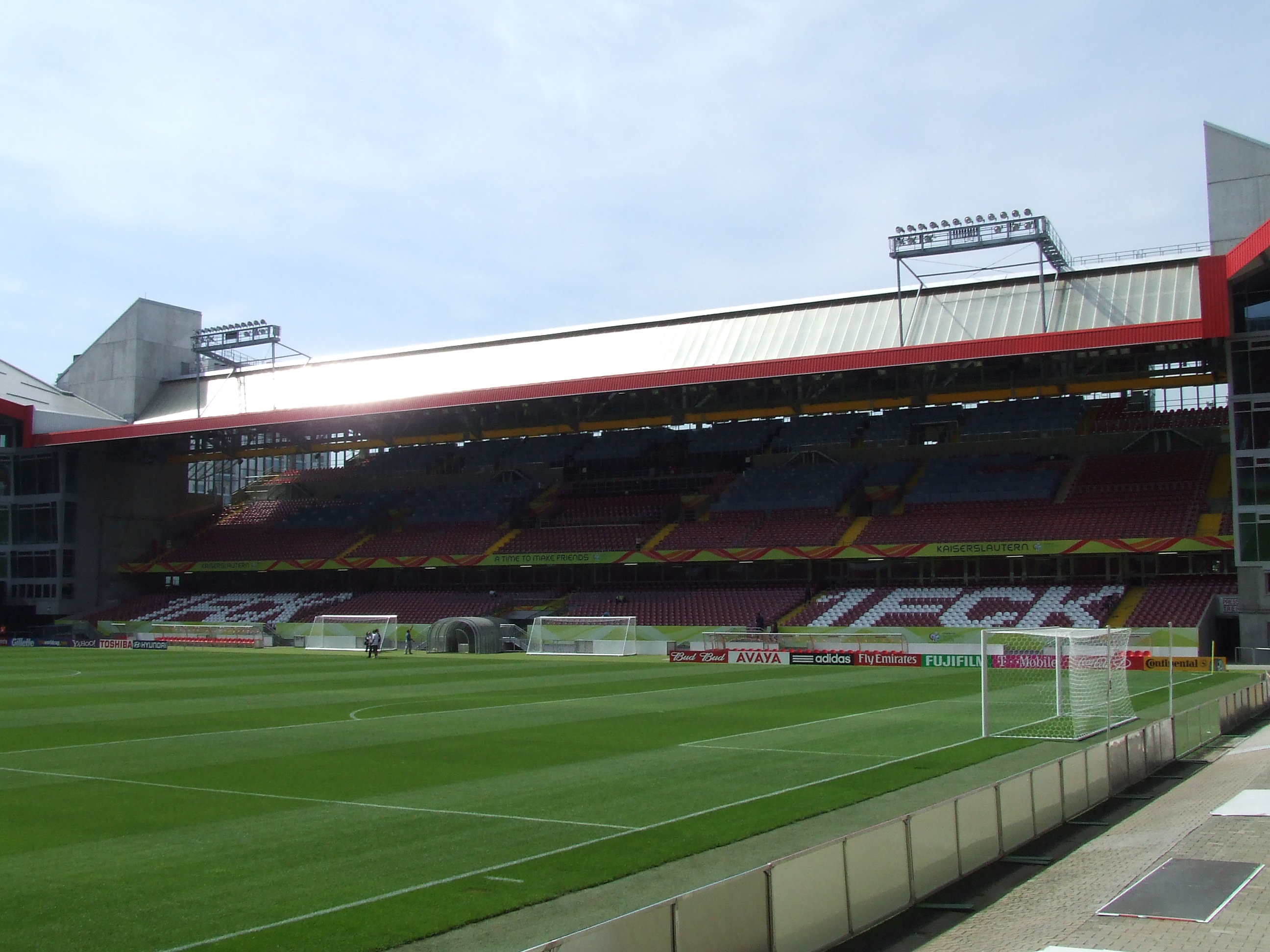 Fritz-Walter-Stadion in Kaiserslautern, vor dem FIFA WM-Spiel Australien gegen Japan, hier die Haupttribüne